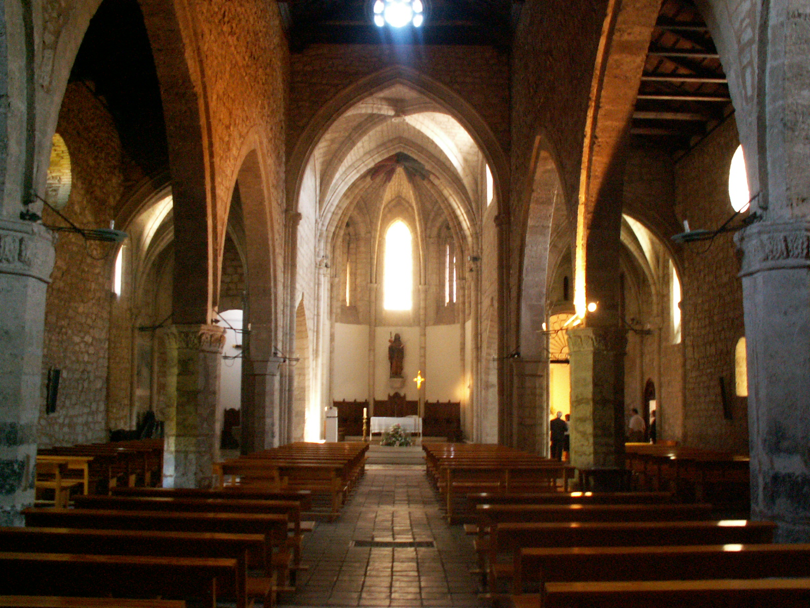 Iglesia de Santiago (Ciudad Real) - Siglo XIII